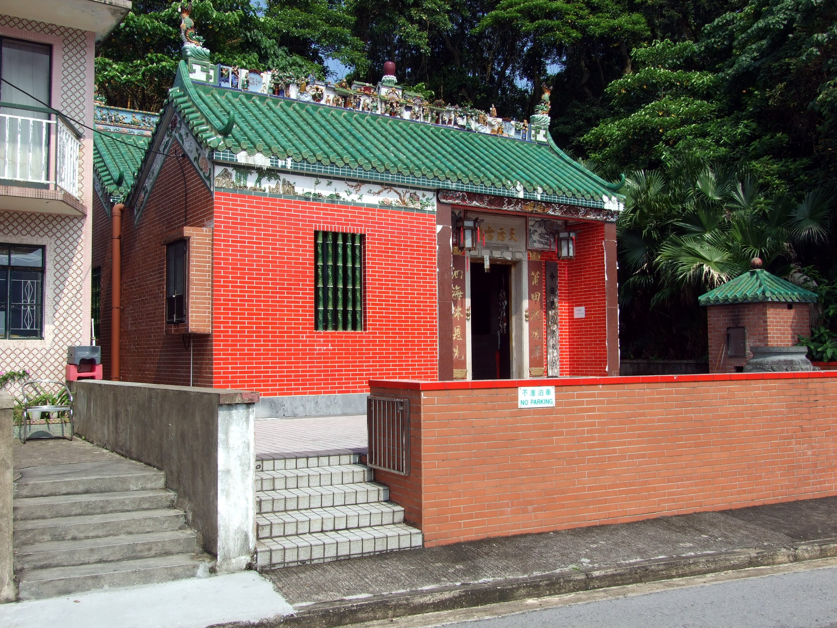 中文（香港）: 南圍天后古廟